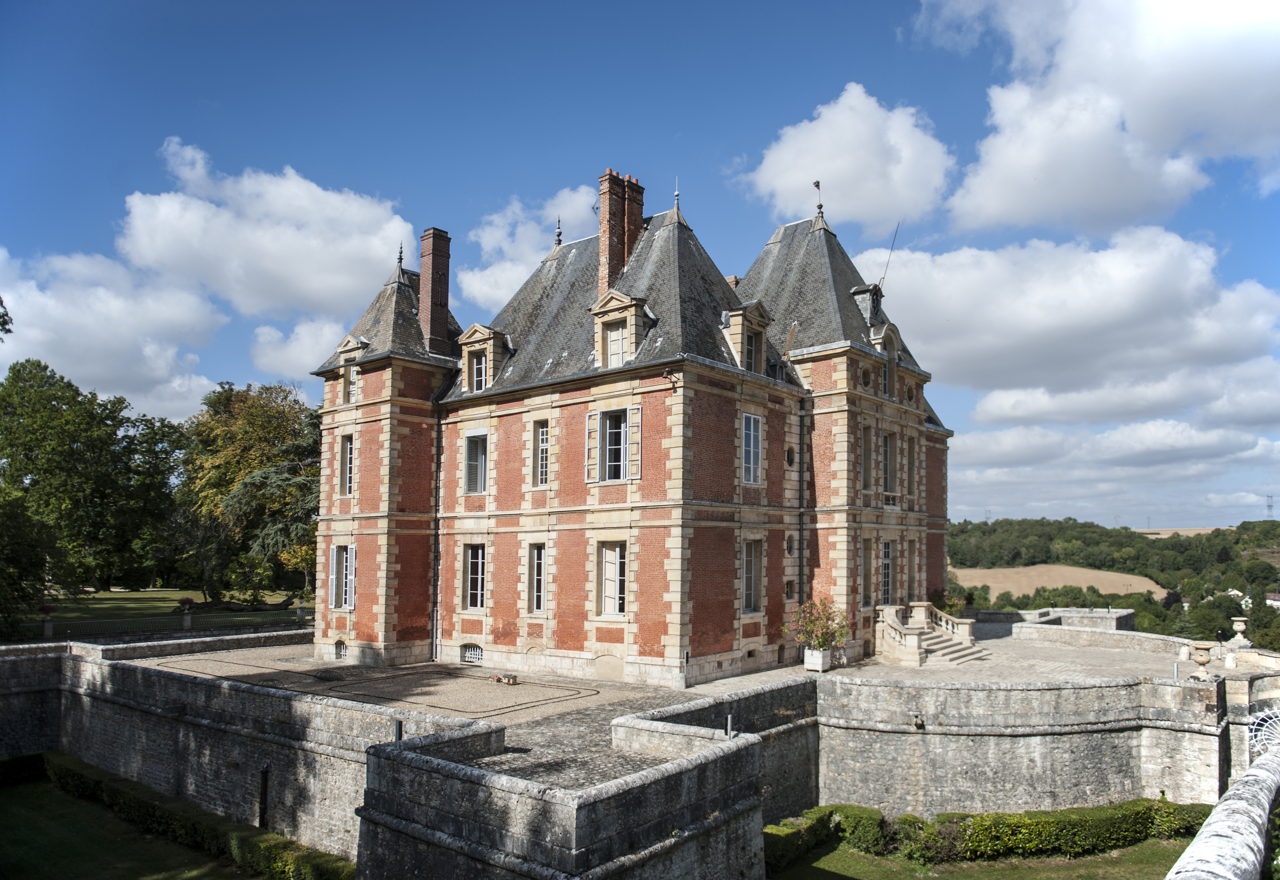 Château du Haut Rosay